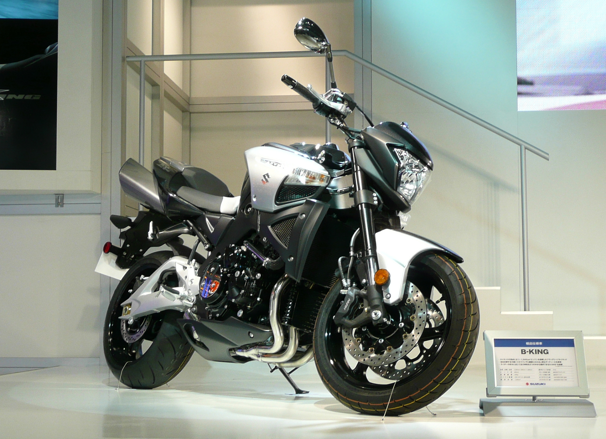 Suzuki B-KING (2007 Tokyo Motor Show)